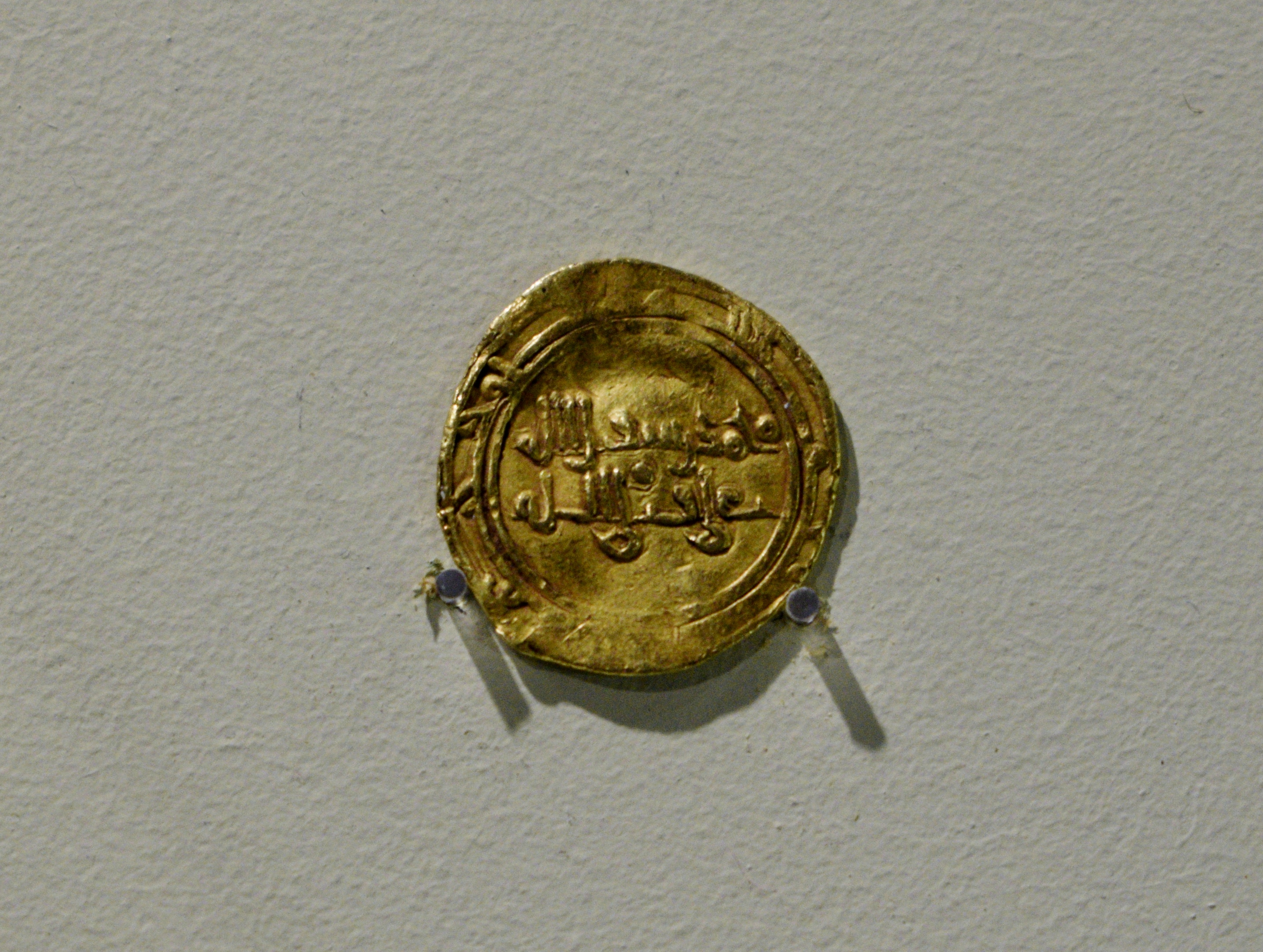 Museo de Albacete. Dinar fatimí de Alí az-Zahir (1021-1036)Oro.